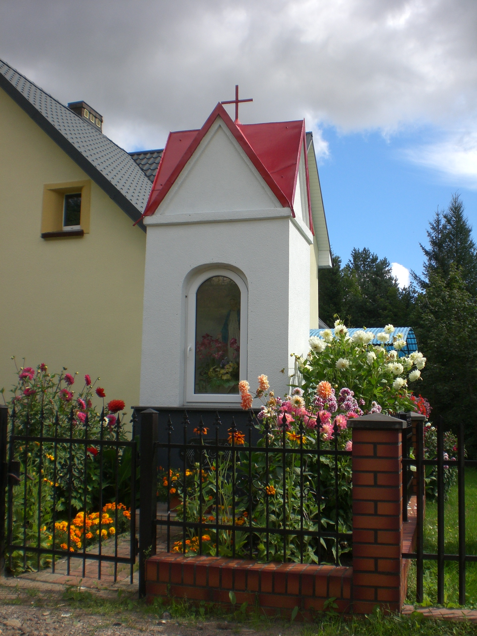 Kosowo - kapliczka